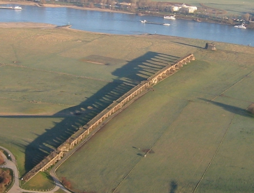 Linksrheinische Reste der Eisenbahnbrücke Wesel über den Rhein – Brücke, Grünland und Rheinufer im Naturschutzgebiet „Rheinaue zwischen Büderich und Perrich“